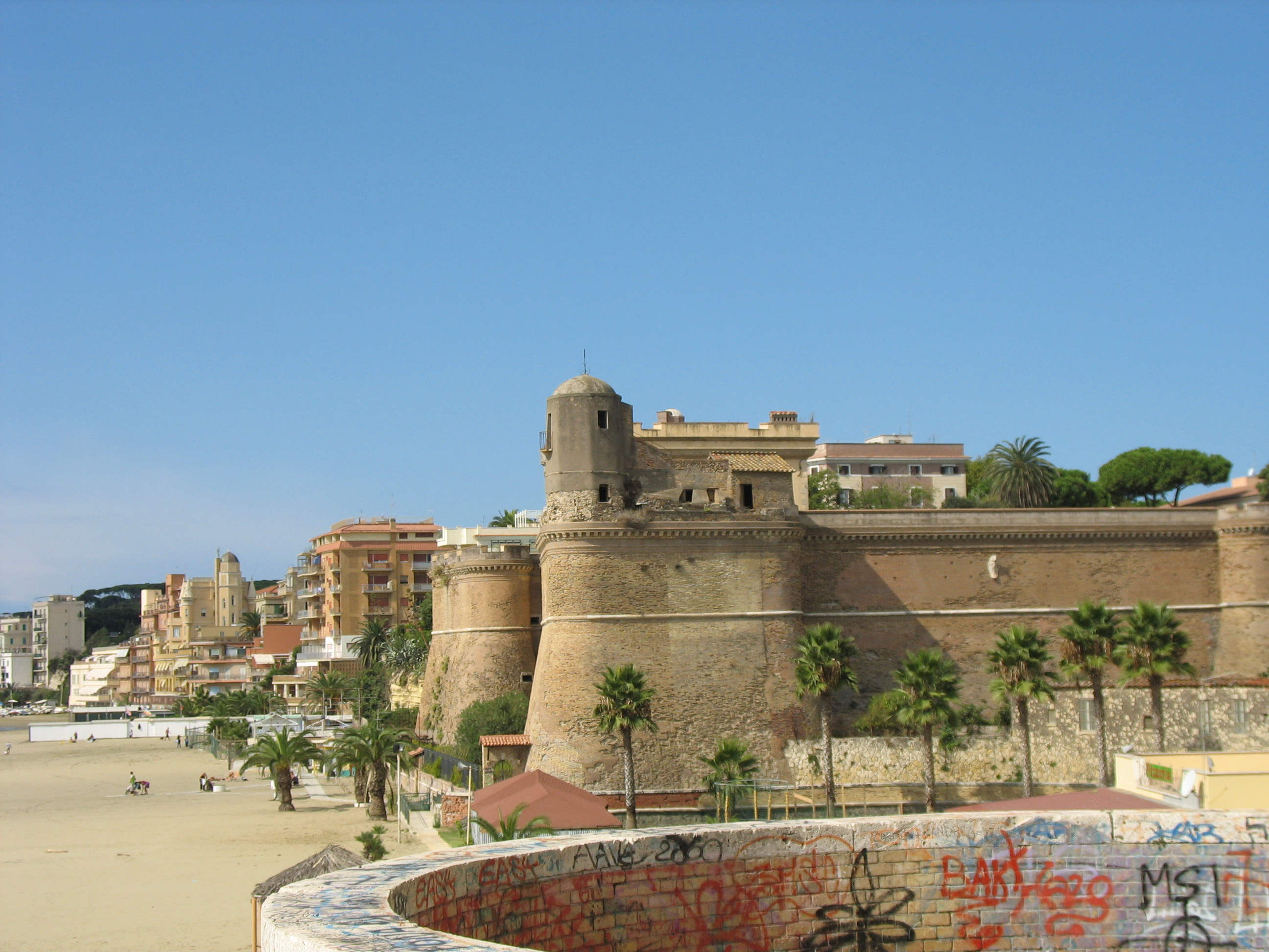 Nettuno (prov. Roma) - stefano, foto mie, fot città , gfdl